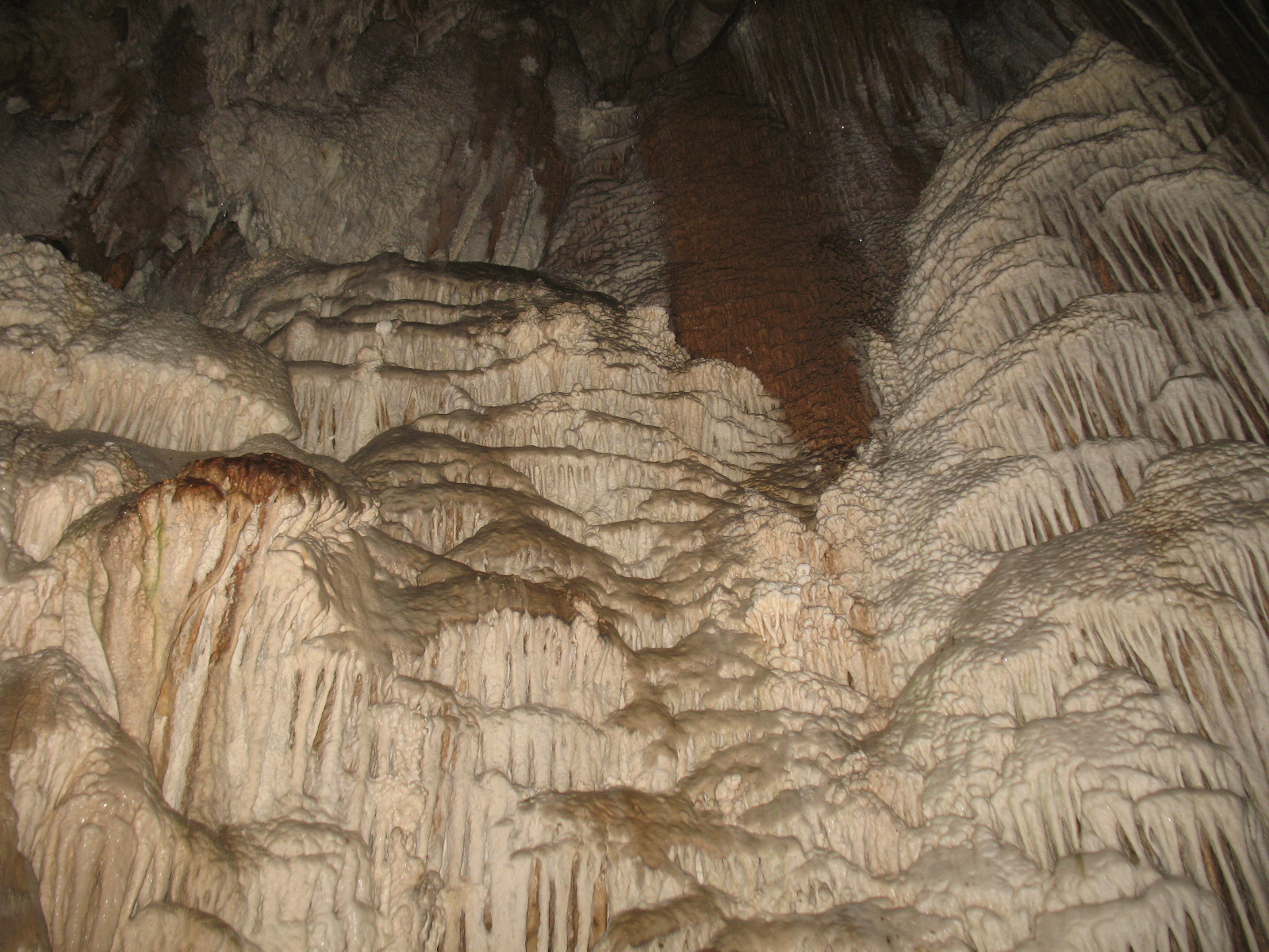 Formacion llamada "Cortinas" en las cuevas de Talgua, Cordillera de Agalta. Honduras. Photo by : Dennis Garcia.